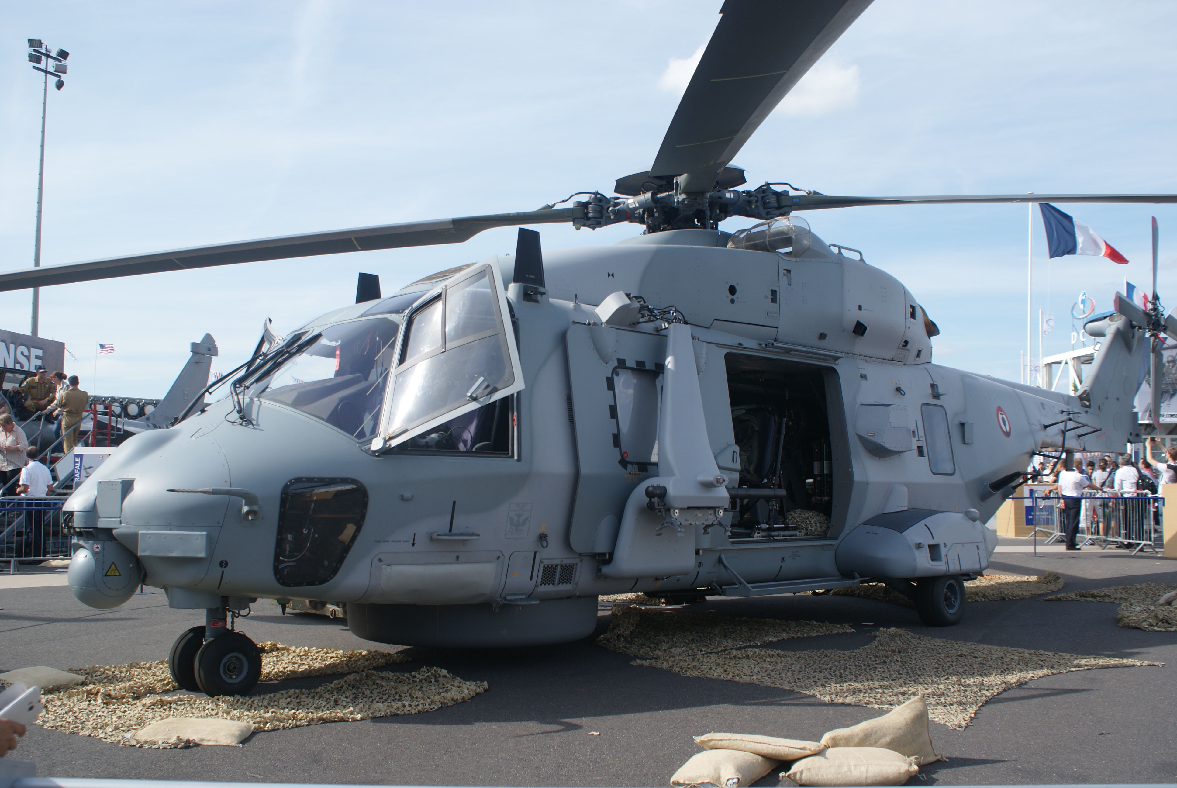 Hélicoptère Caïman Marine de la Marine nationale française présenté lors du salon du Bourget 2015